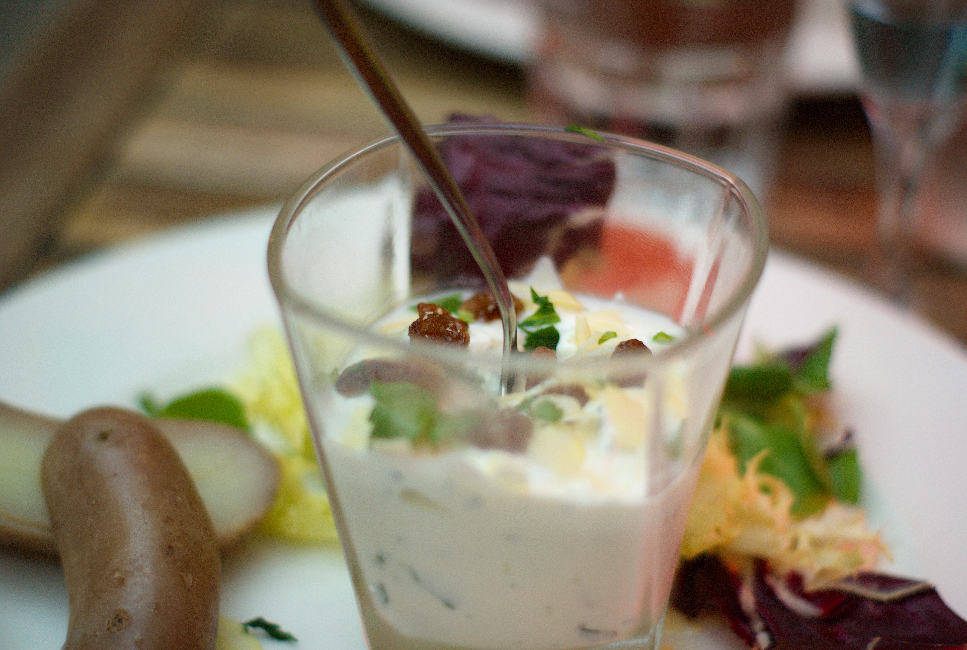 Servi en entrée dans le menu Lyonnais du restaurant "A la Traboule" (3 Place du Gouvernement, 69005 Lyon) dans le Vieux Lyon.